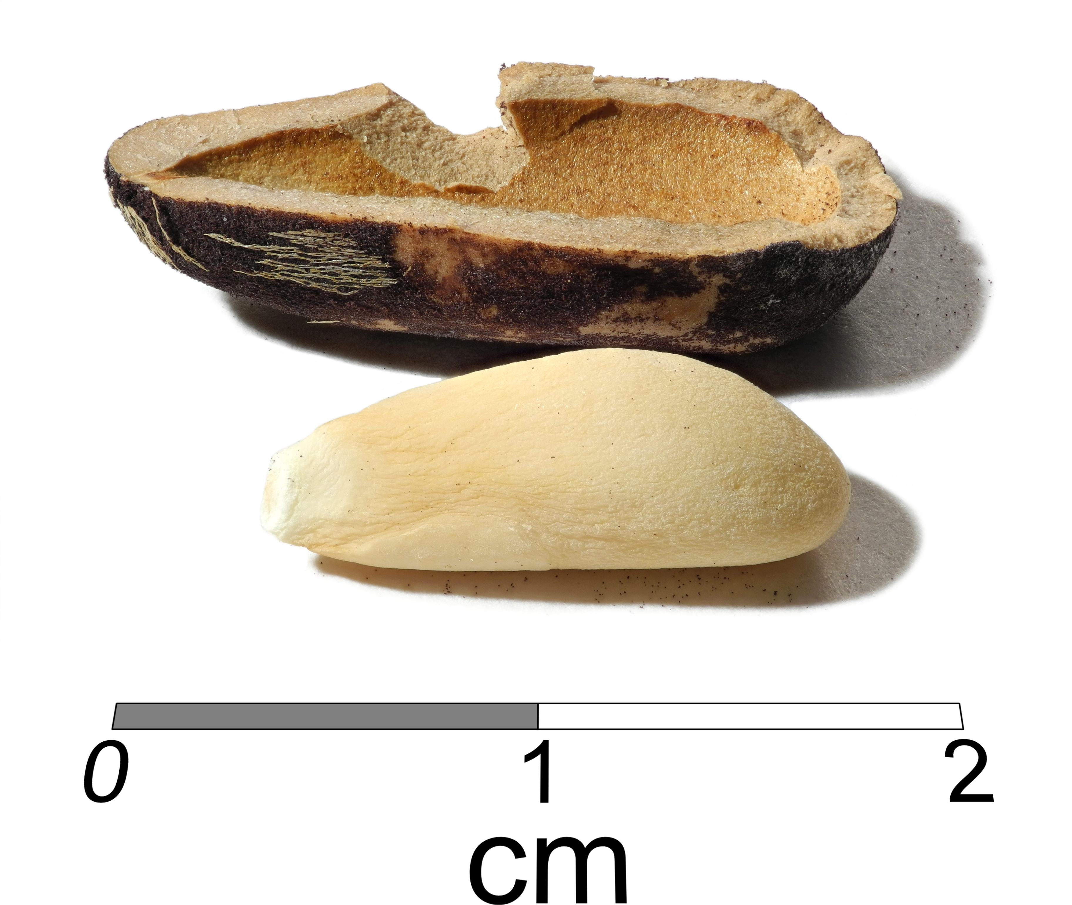 Focus stacking of 27 pictures (using Zerene Stacker).Graine de pin parasol Pinus pinea (focus stacking). Image composée de 27 photos prises avec la bonnette Raynox DCR-250 et assemblées avec Zerene Stacker.